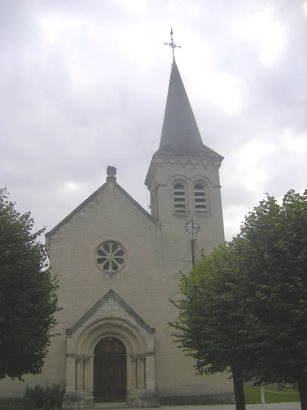 Nampcel